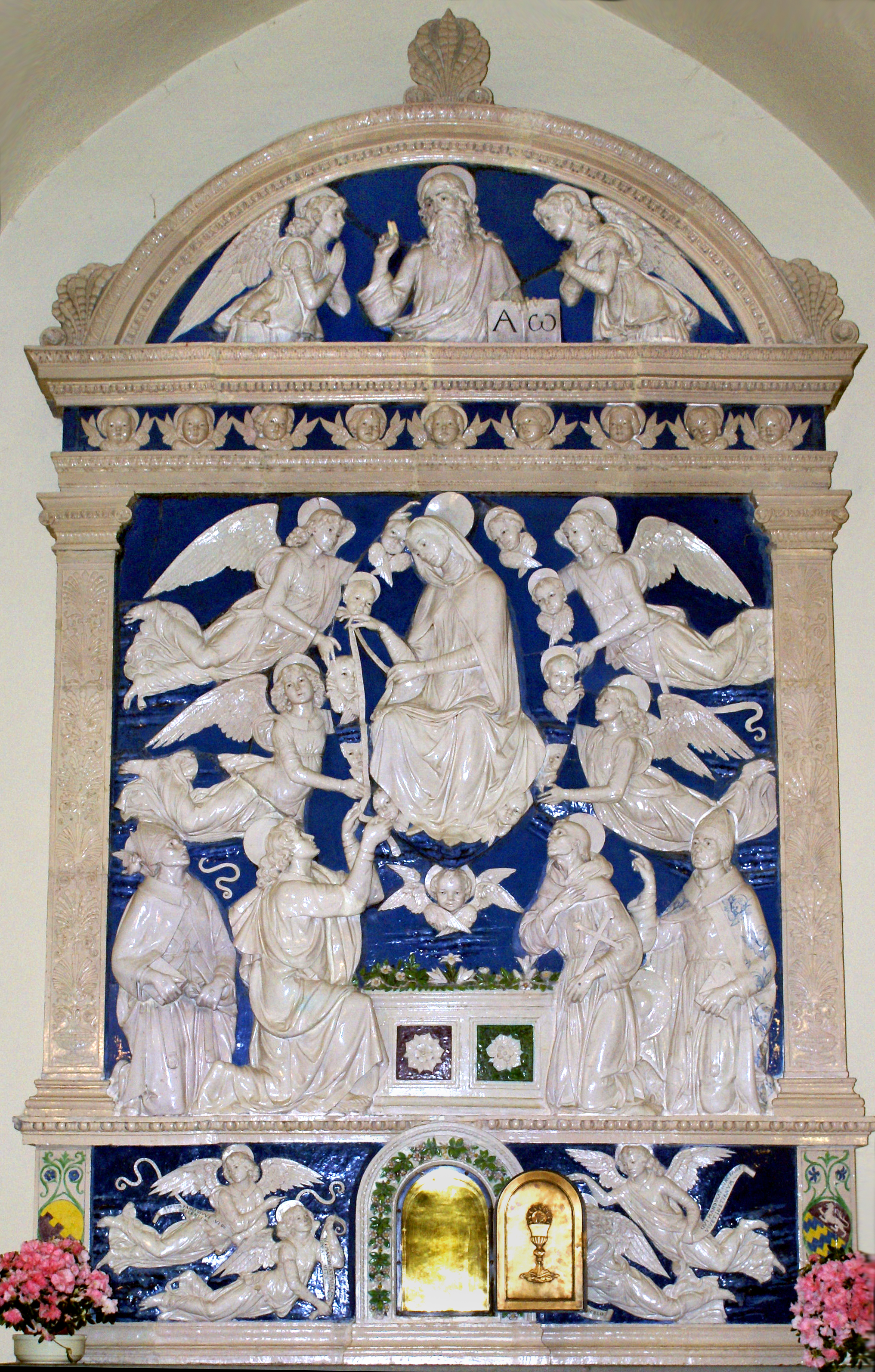 Andrea della Robbia, Marias Himmelfart, La Verna